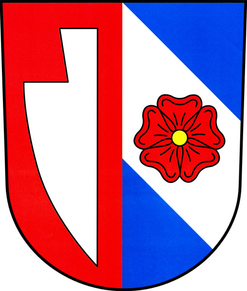 Znak obce Popovice (okres Brno-venkov)